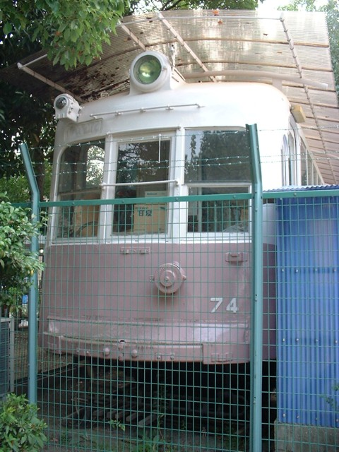 阪神国道線71形 74号 蓬川公園（尼崎市崇徳院3丁目）にて静態保存